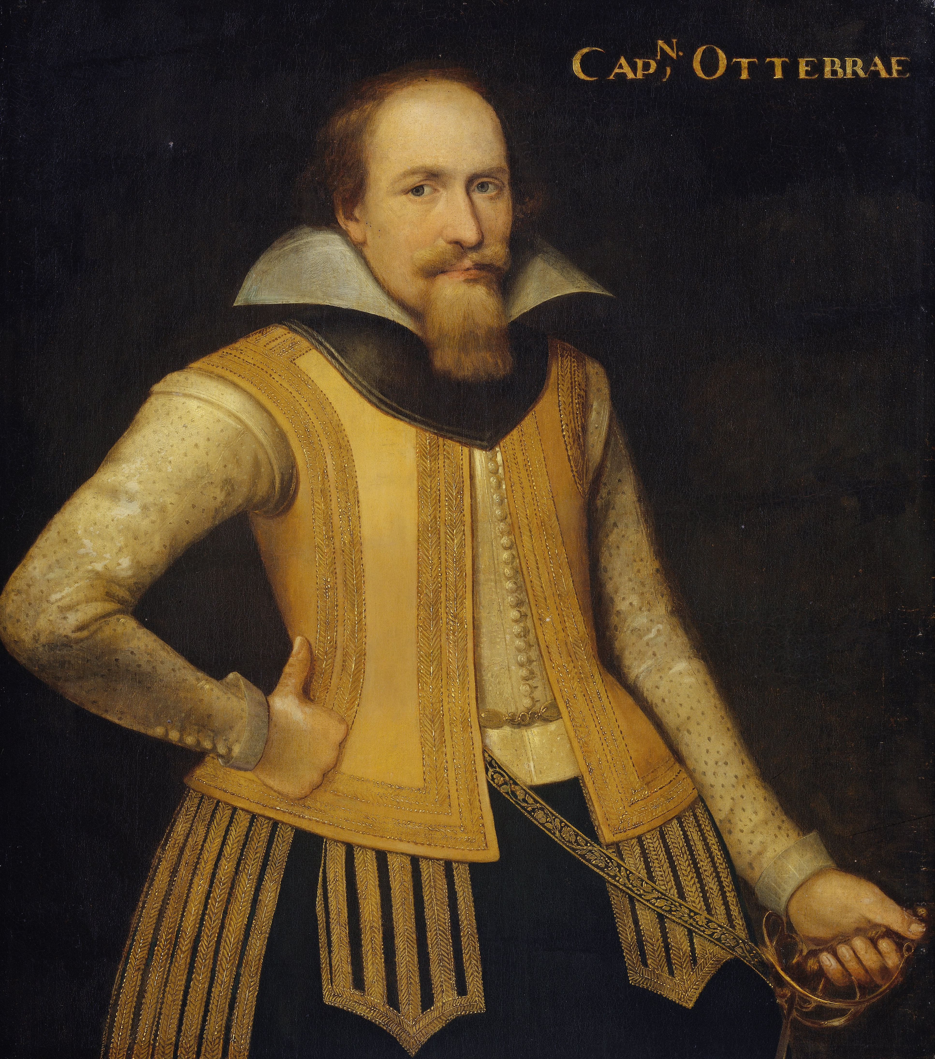 Portret van Otto Brahe. Kapitein van een compagnie Denen ter repartitie van Zeeland; trad in 1610 in Brandenburgse dienst. Staande, ten halven lijve, de rechterhand in de zij, de linkerhand om het gevest van de degen.